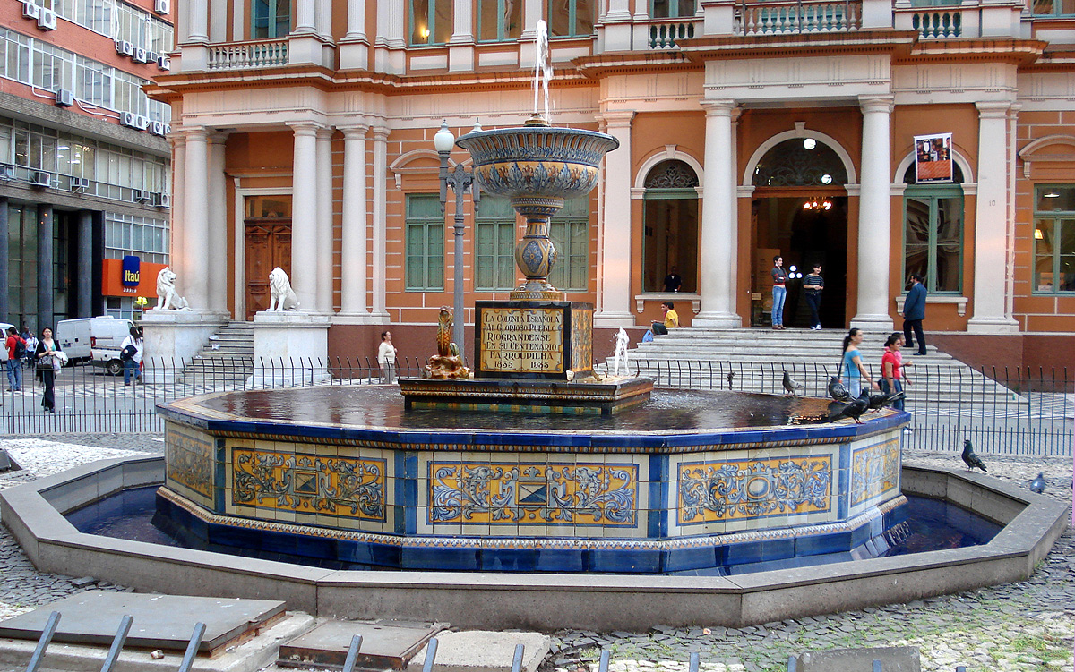 Fonte Talavera de la Reina, defronte à Prefeitura Minicipal dePorto Alegre, Brasil.